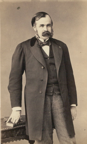 Alphonse, Alfred Haentjens (1824-1884)